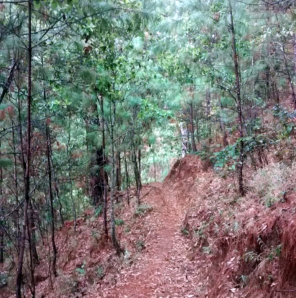 Camino a Santa Cruz Yucacani, municipio de Tlacoachistlahuaca; Guerrero.